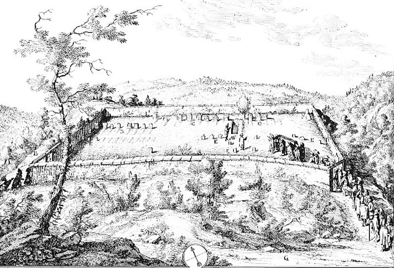 Jüdischer Friedhof Endingen, Surb Valley, Endingen–Lengnau, Canton of Aargau in Switzerland: 'Friedhoof oder Begräbniß Ohrt der Juden zwischen Längnau und Endingen. Aus: Johann Caspar Ulrich: Sammlung jüdischer Geschichten, Teil 4, 1754, S. 299.